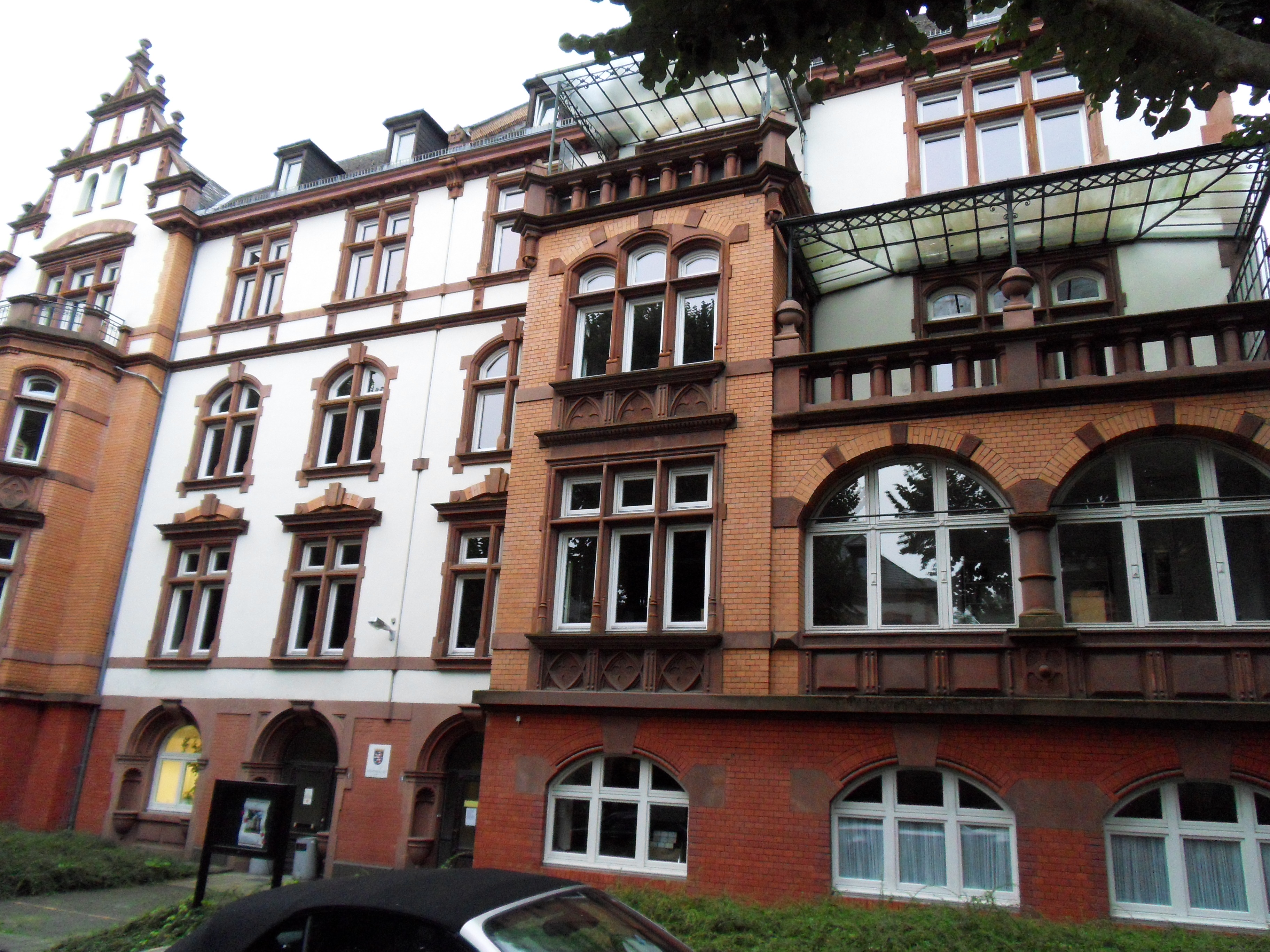 Hessenkolleg in der Alexandrastraße in Wiesbaden, Nordseite